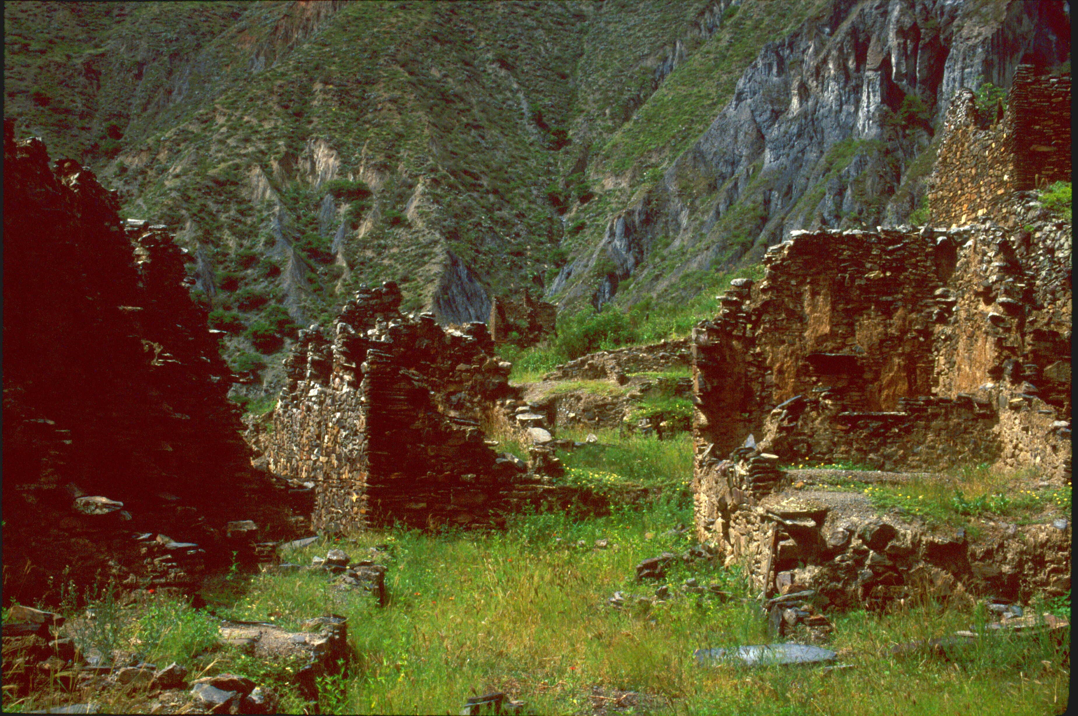 Ruinas Arqueológicas de la ciudadela de Iskanwaya This medium shows the protected monument with the number L/00-305 in Bolivia.